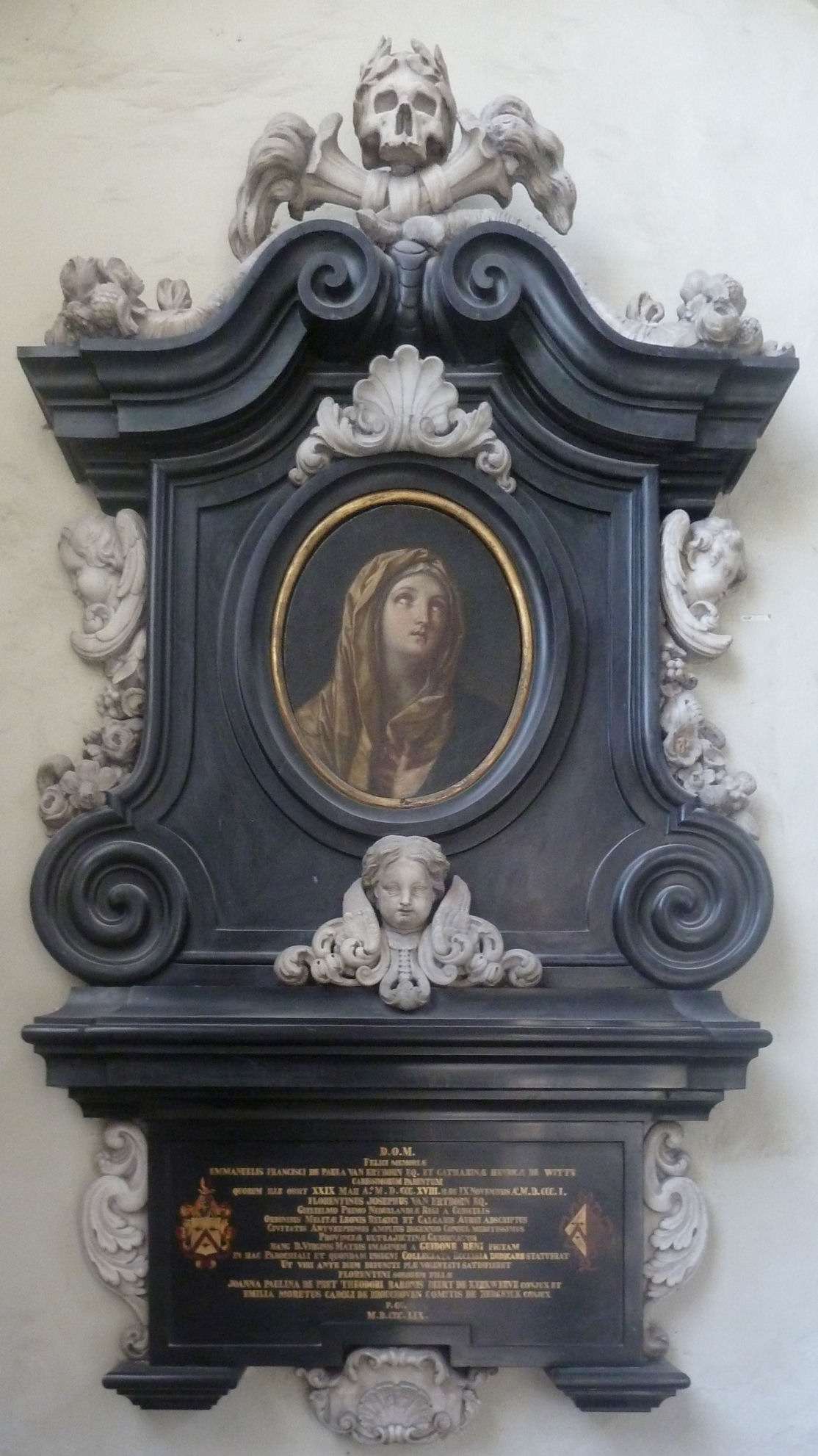 Epîtaaf SJACOBVS/'Emmanuel-François Van-Ertbron, chevalier, and Catherine-Henriette de Witte, painting by Guido Reni